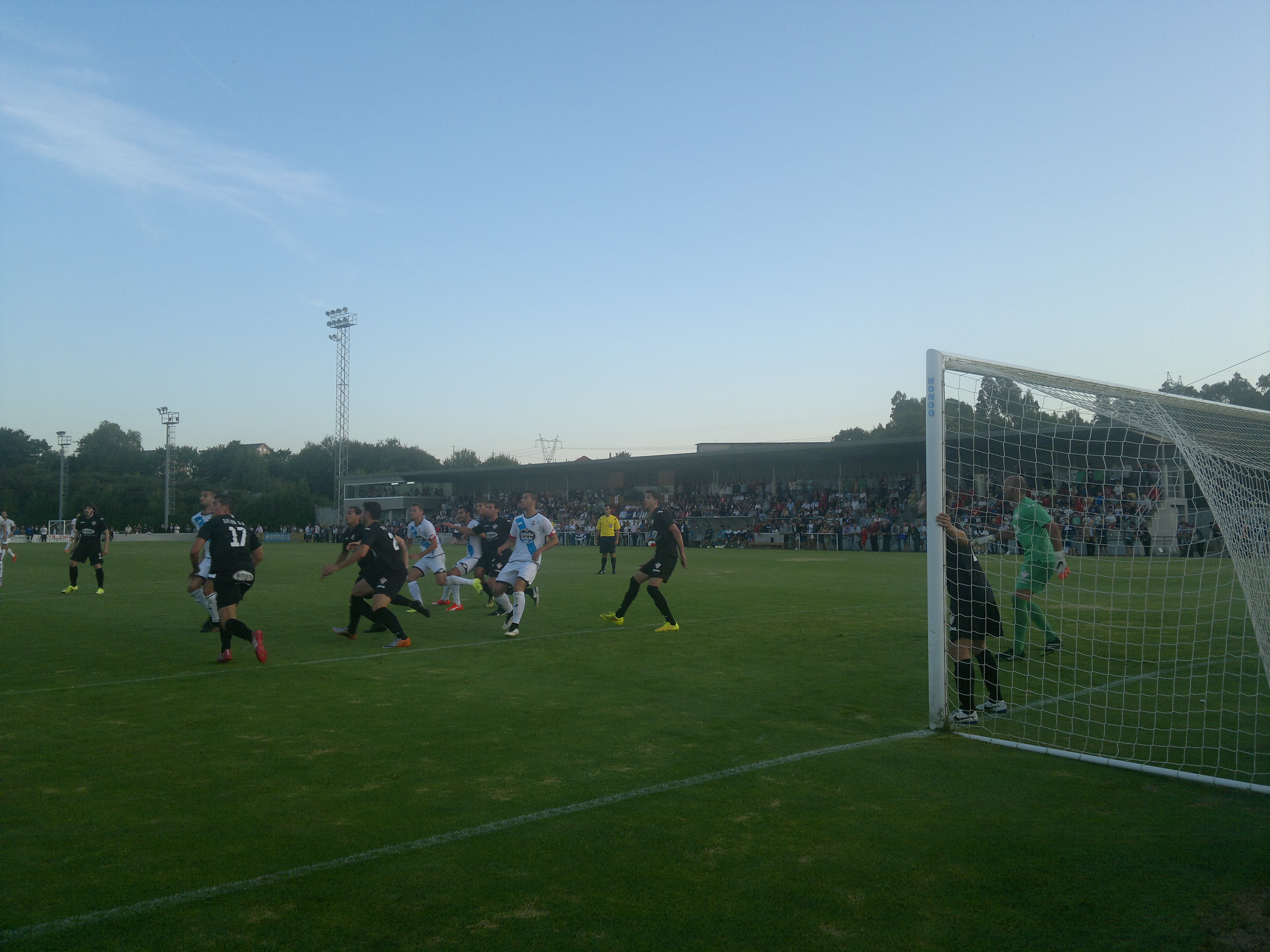 Partido entre o Deportivo da Coruña e o Silva Sociedade Deportiva no campo do Roxo (Cerceda) correpondente ó Memorial Antonio Meirás (2015).